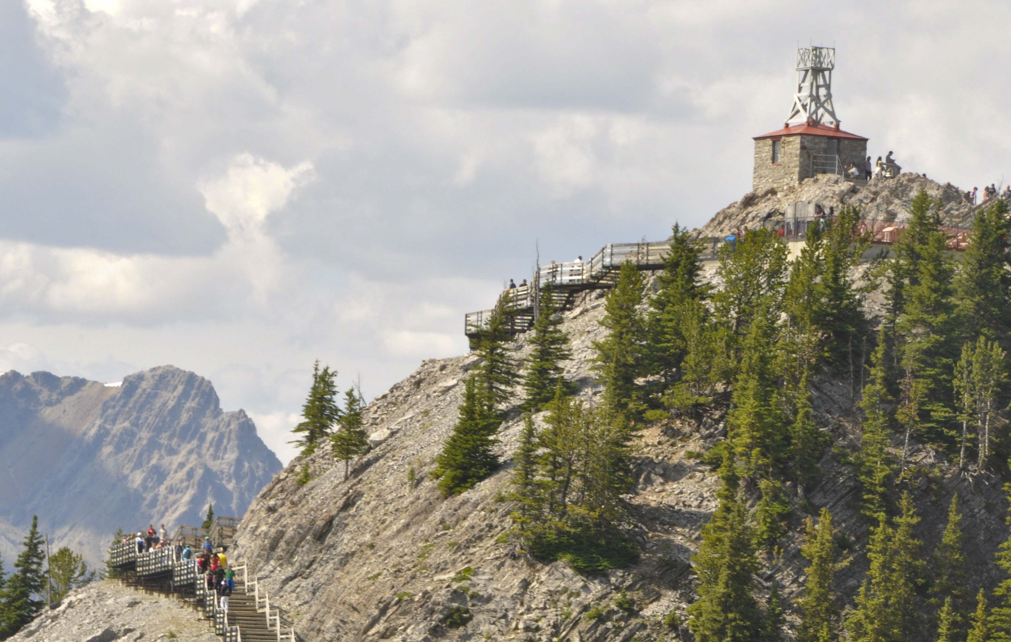 Lieu historique national du Canada de la Station d'Étude des Rayons Cosmiques du Mont Sulphur